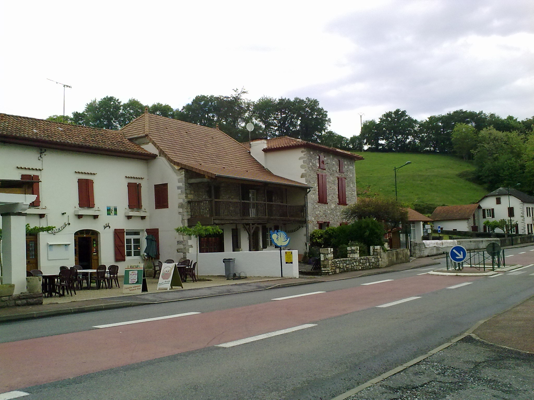 Uhart-Mixe, France